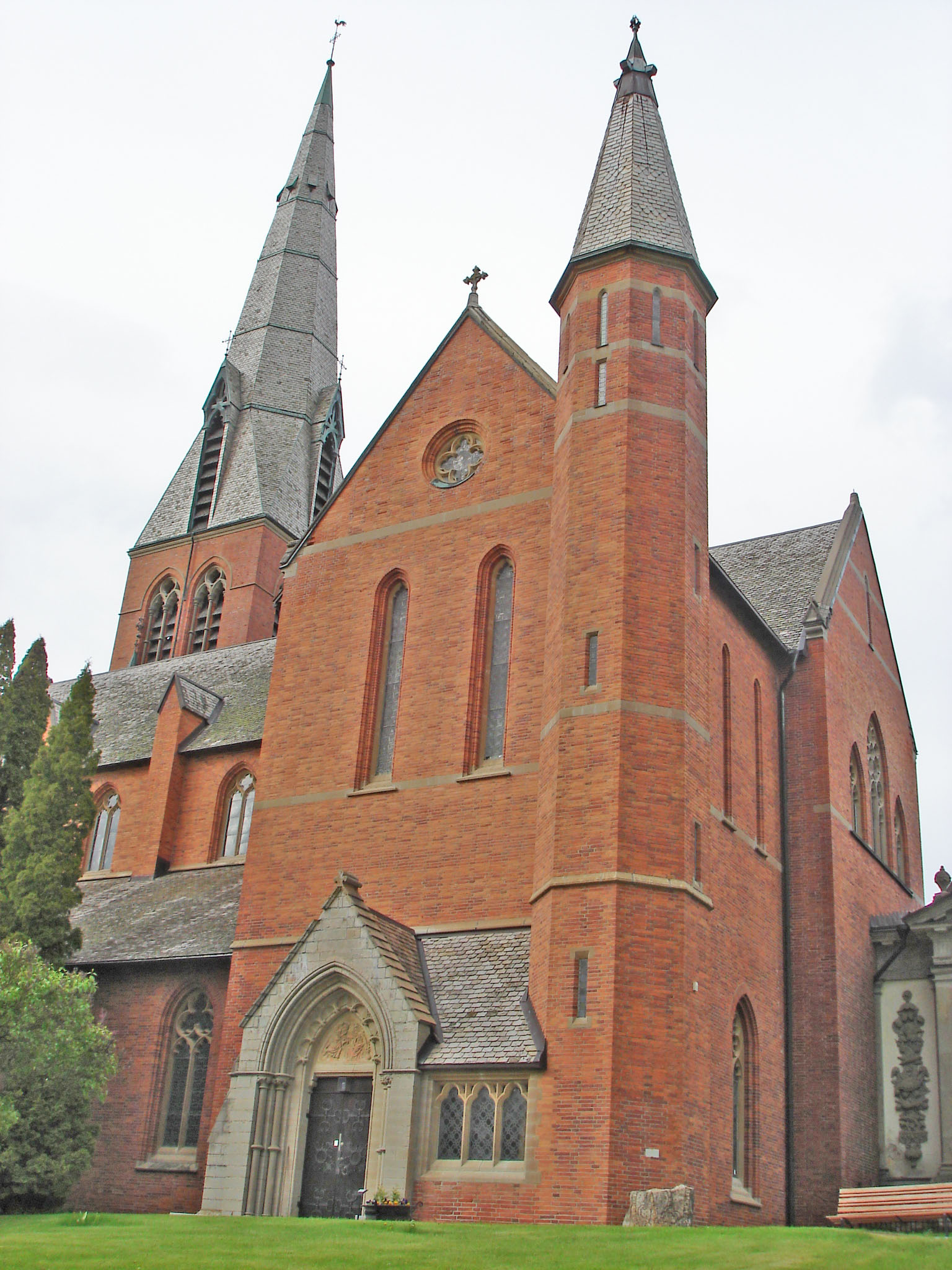 Fotat av församlingsmedlem (tompen0000), 2006